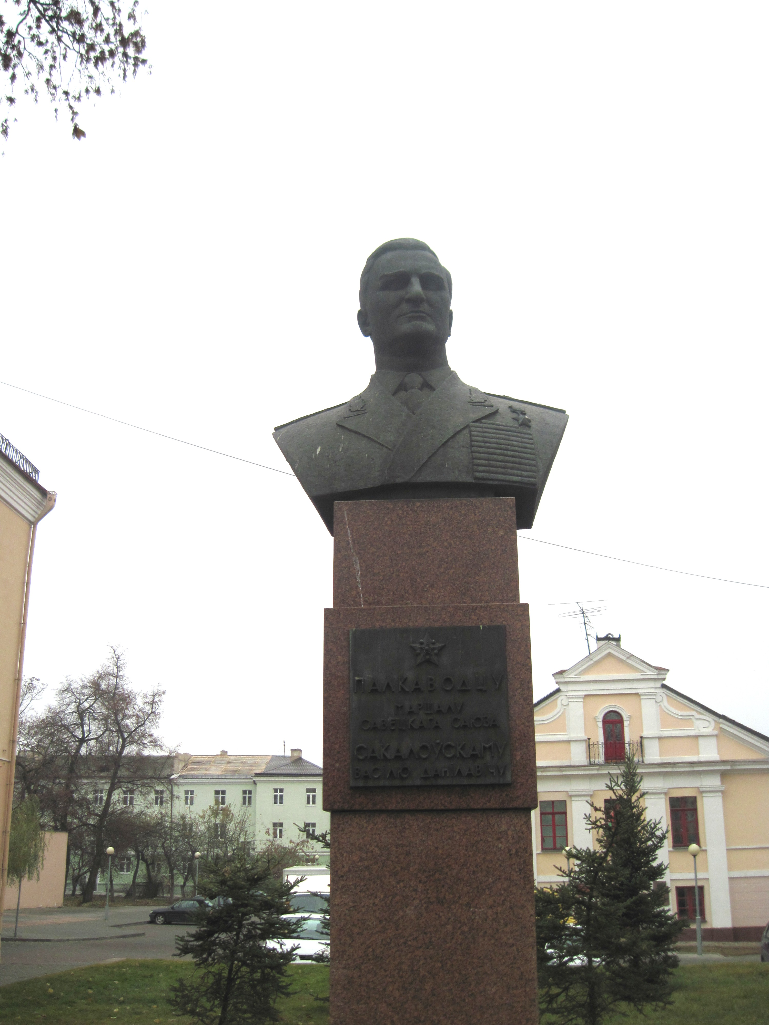 Беларуская (тарашкевіца): Помнік Сакалоўскаму ў скверы па вуліцы Савецкая